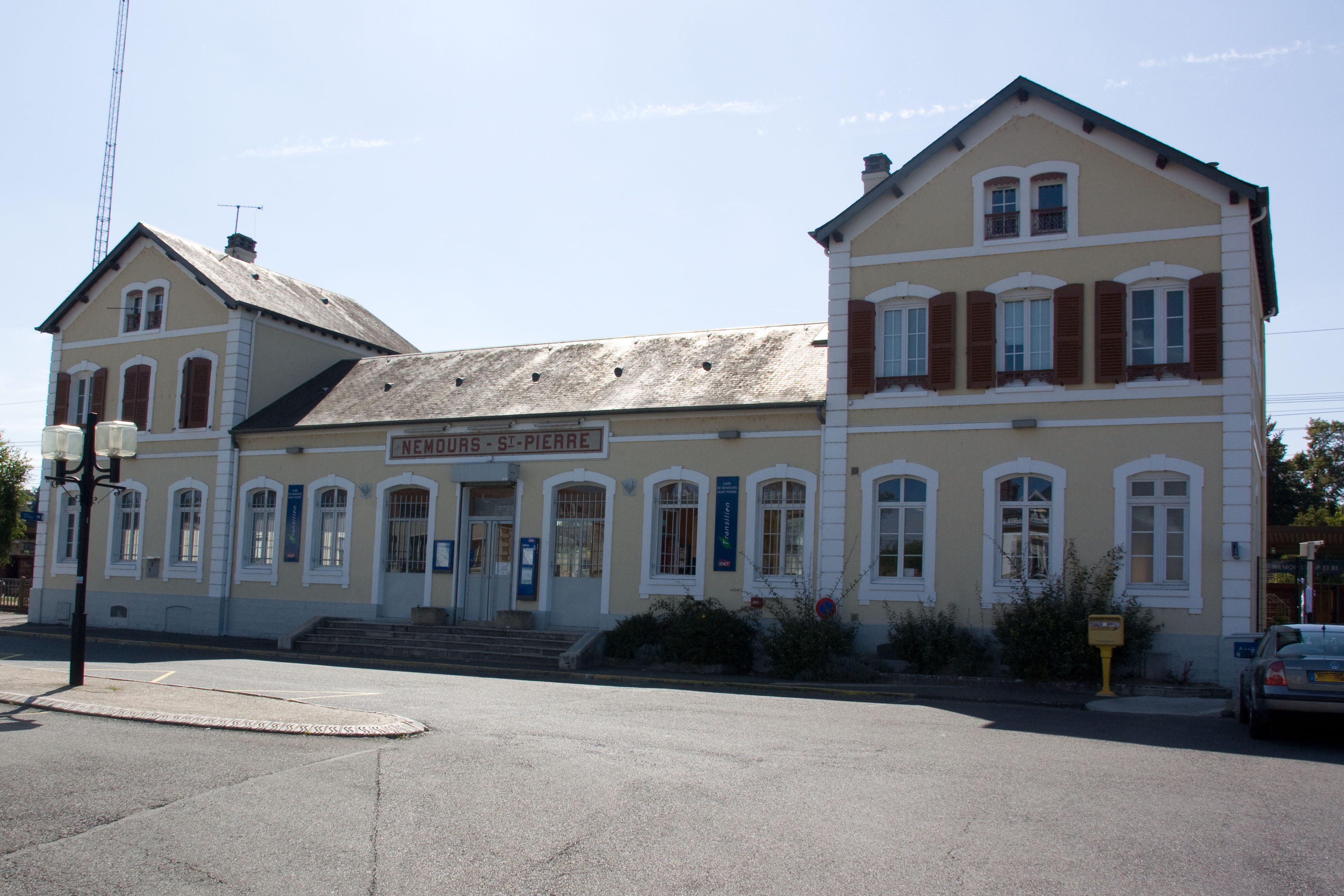 Gare de Nemours - Saint-Pierre. Saint-Pierre-lès-Nemours, Seine-et-Marne, France.